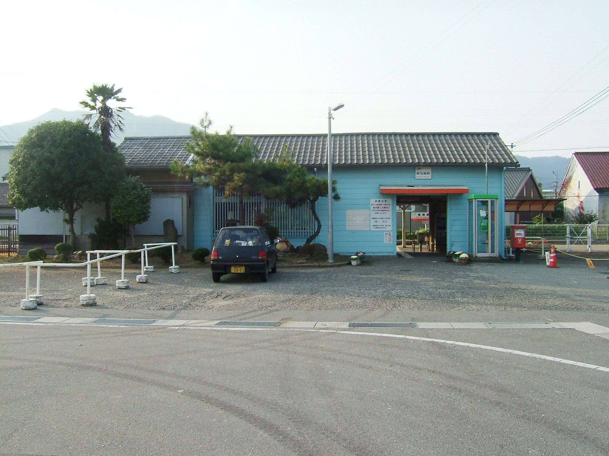 JR Kishin Line Higashi-Hashisaki Station